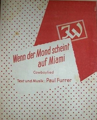 Umschlag Notenblatt